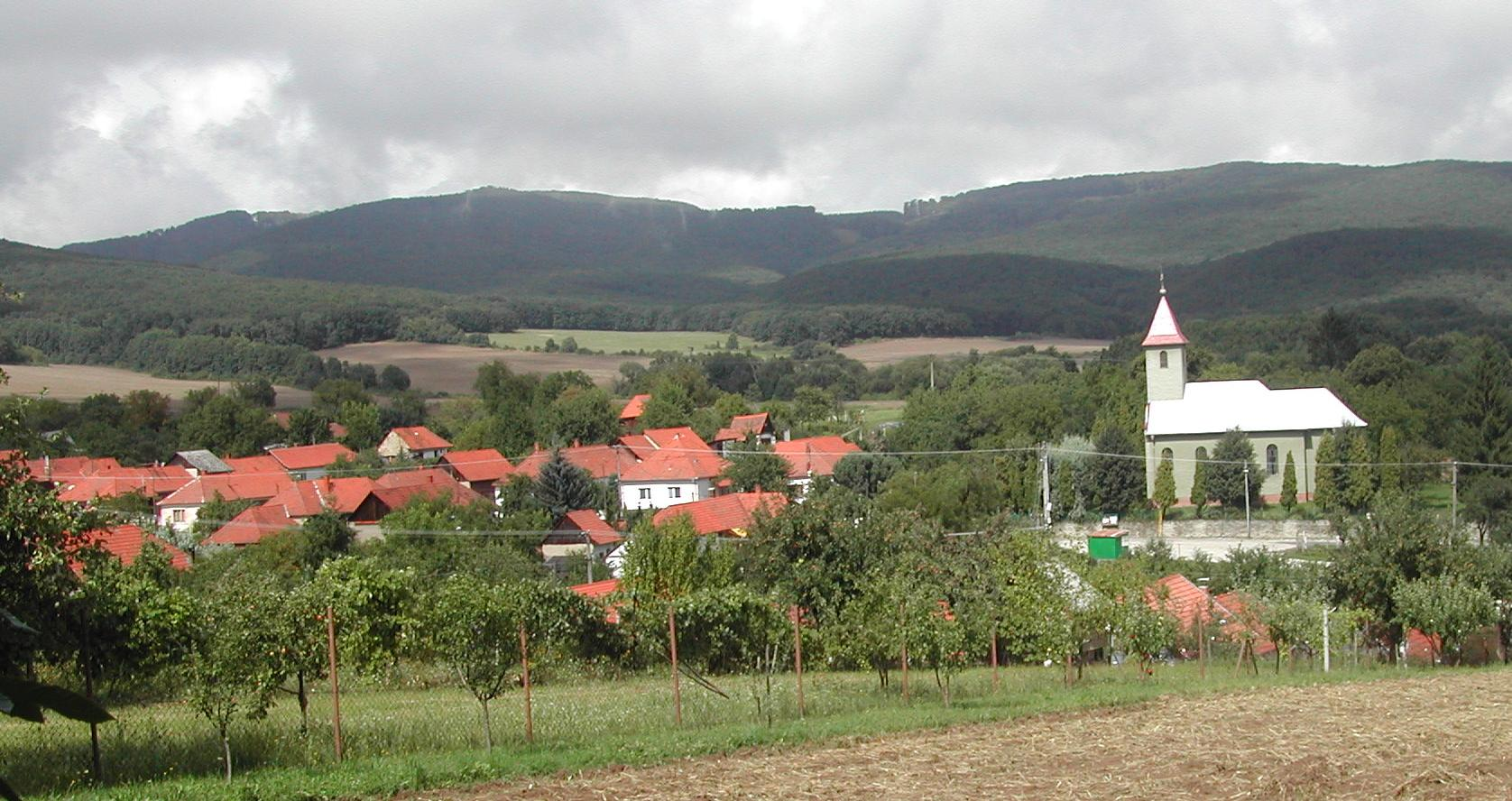 Obec Zlatno, okres Zlaté Moravce